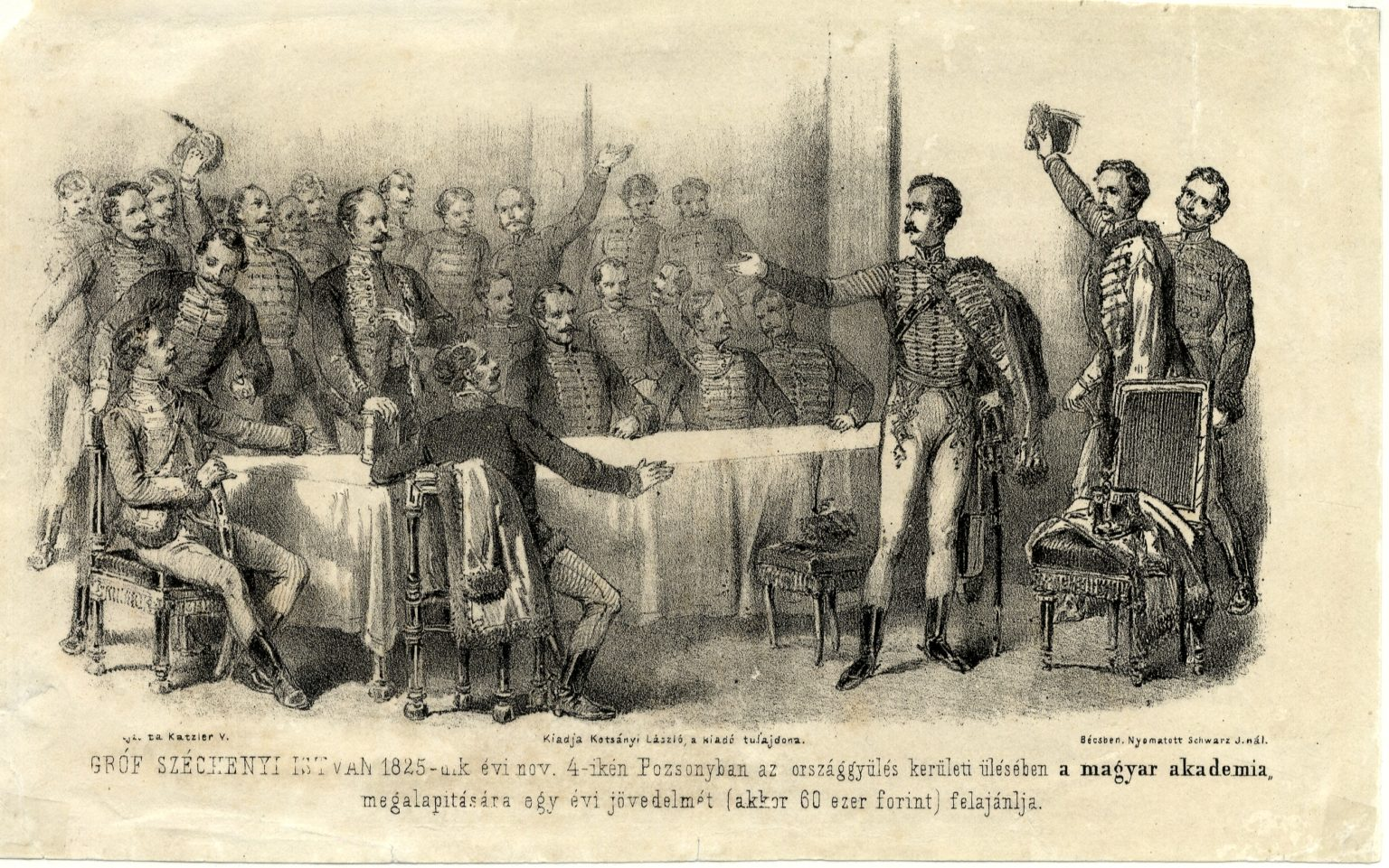 Vinzenz Katzler: Széchenyi István felajánlja birtokainak egyévi jövedelmét egy Tudós Társaság alapítására (litográfia). "Grőf Széchenyi István 1825-dik évi nov. 4-ikén Pozsonyban az országgyűlés kerületi ülésében a magyar akadémia megalapitásár a egy évi jövedelmét (akkor 60 ezer forint) felajánlja " "Kőre rajz Katzler V. " "Kiadja Kotsányi Lászó